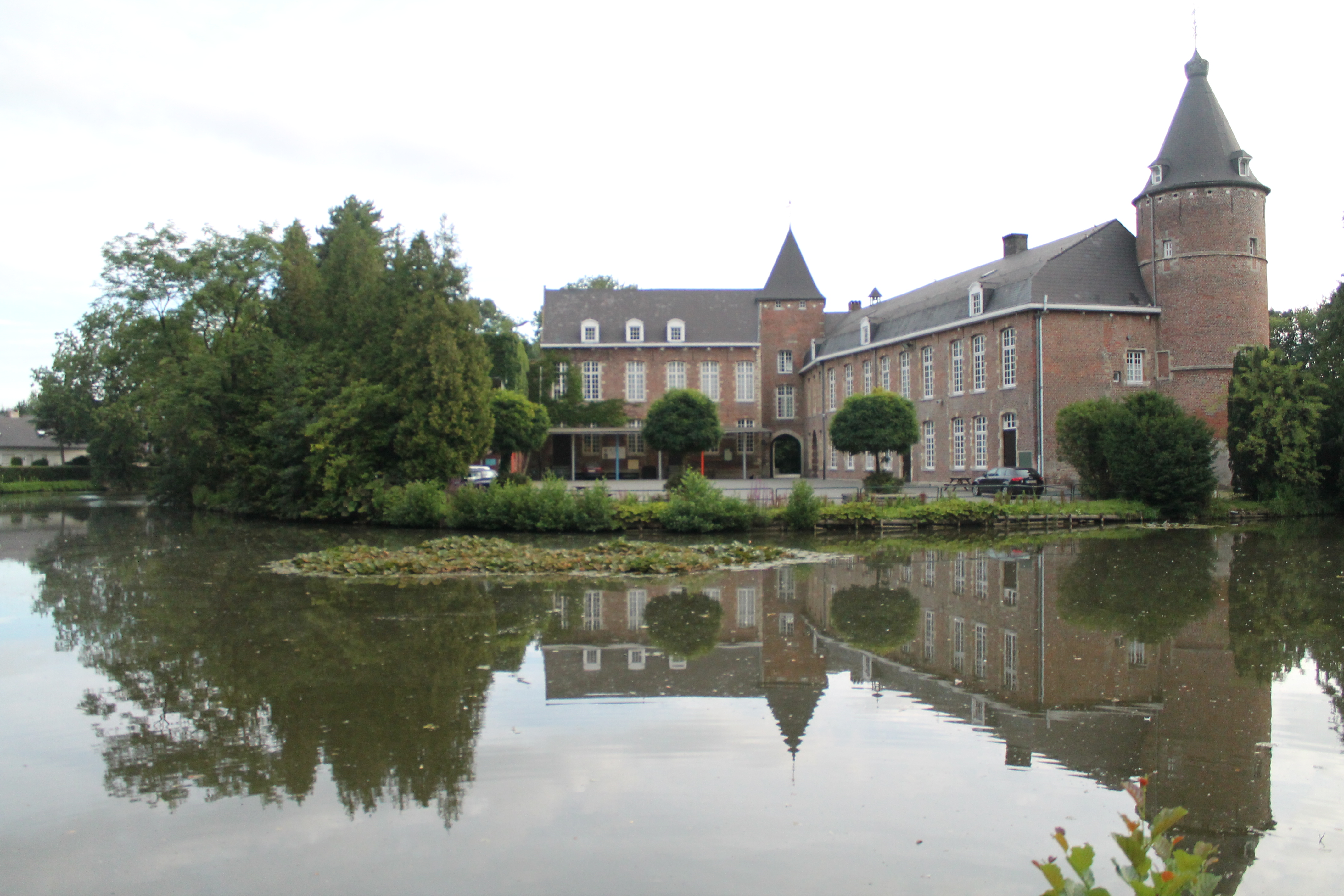 Dit is het kasteel Kruikenburg in Ternat